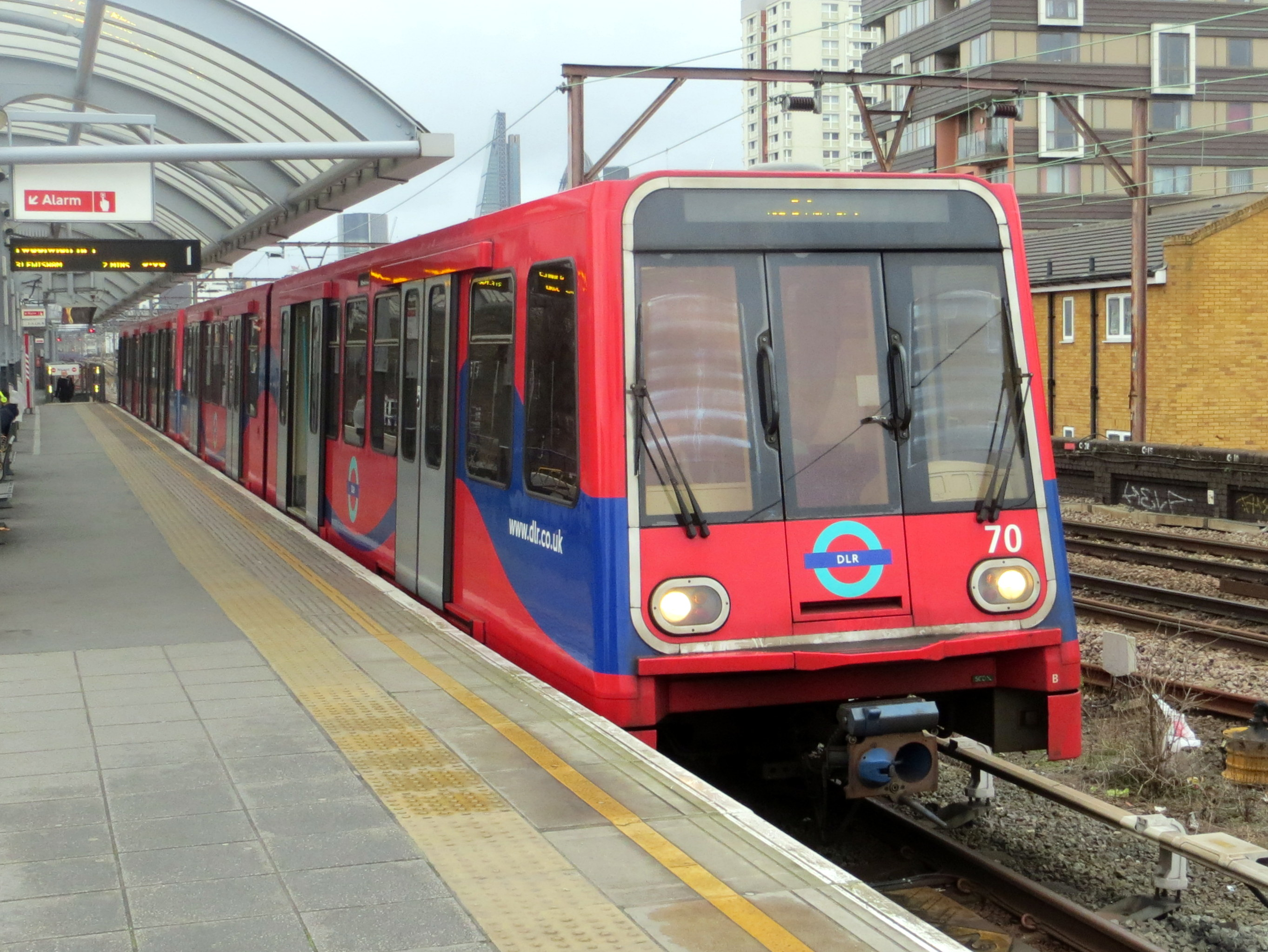 Richting Woolwich Arsenal.